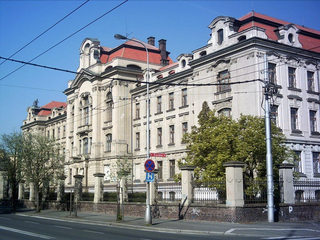 Budova na Pospisilove ulici